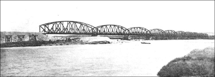 Ferrovia di Baghdada Ponte sull'Eufrate